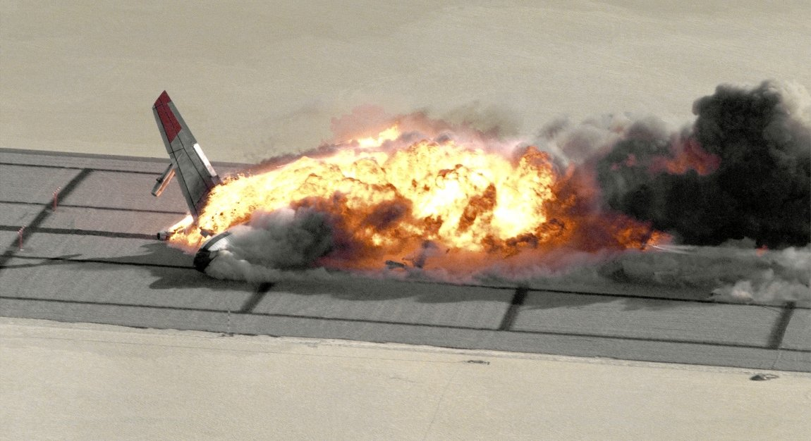 Controlled Impact Demonstration Fire